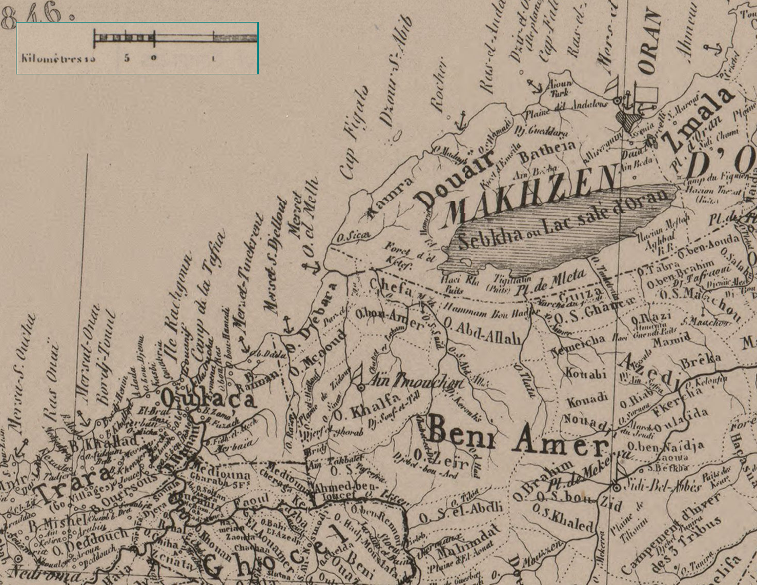 Algérie, vers 1845. Carte des tribus autour d'Aïn Témouchent. Extrait de la carte de E. Carette et Auguste Warnier publiée par l'institut géographique national français en 1846.